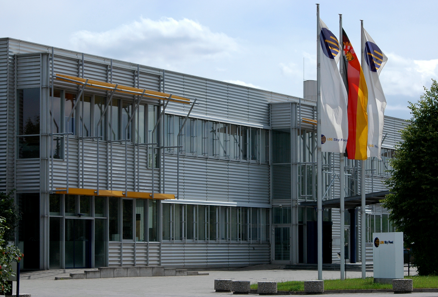 LSG Sky Food GmbH front Ansicht